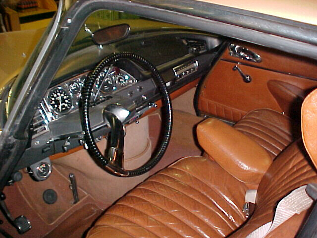 Interior DS Pallas model 1969 full option